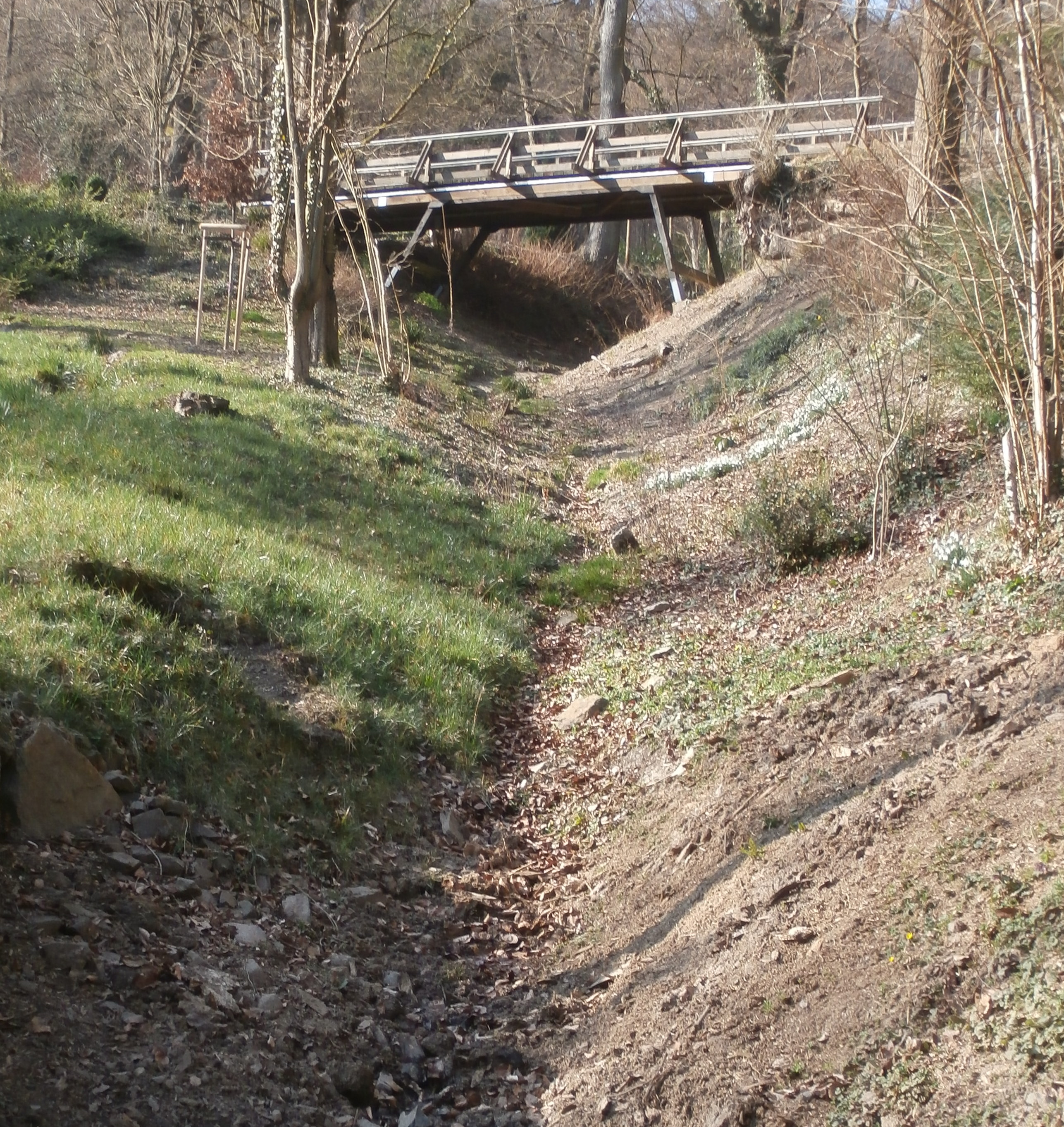 Waldfriedhof, Rhöndorf: Hohlweg mit Fußgängerbrücke